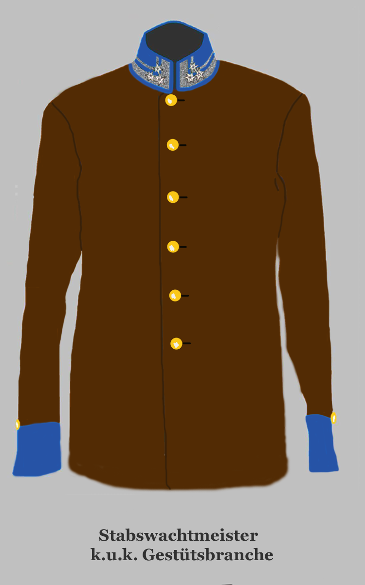 Stabswachtmeister der k.u.k. Gestütsbranche (Silberen Tressen an den Rangabzeichen ab 1914)